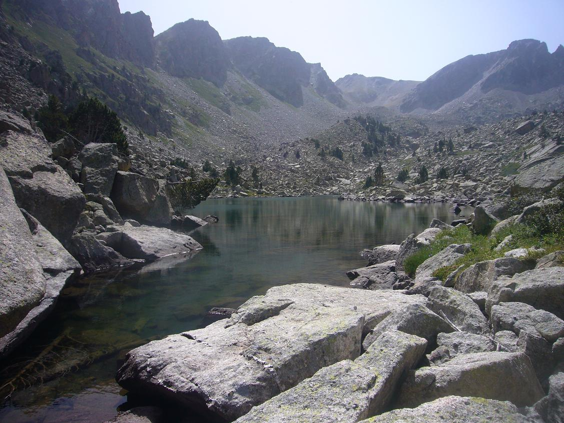 Estany de les Mussoles vist des del seu desguàs, la Vall de Boí, Alta Ribagorça, Catalunya.